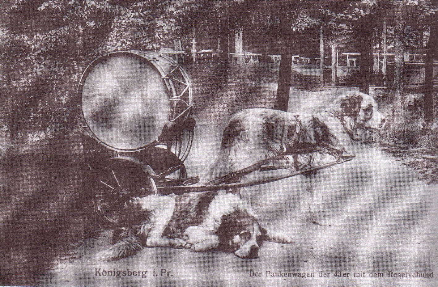 Zwei Paukenhunde des Königsberger Infanterie-Regiments 43